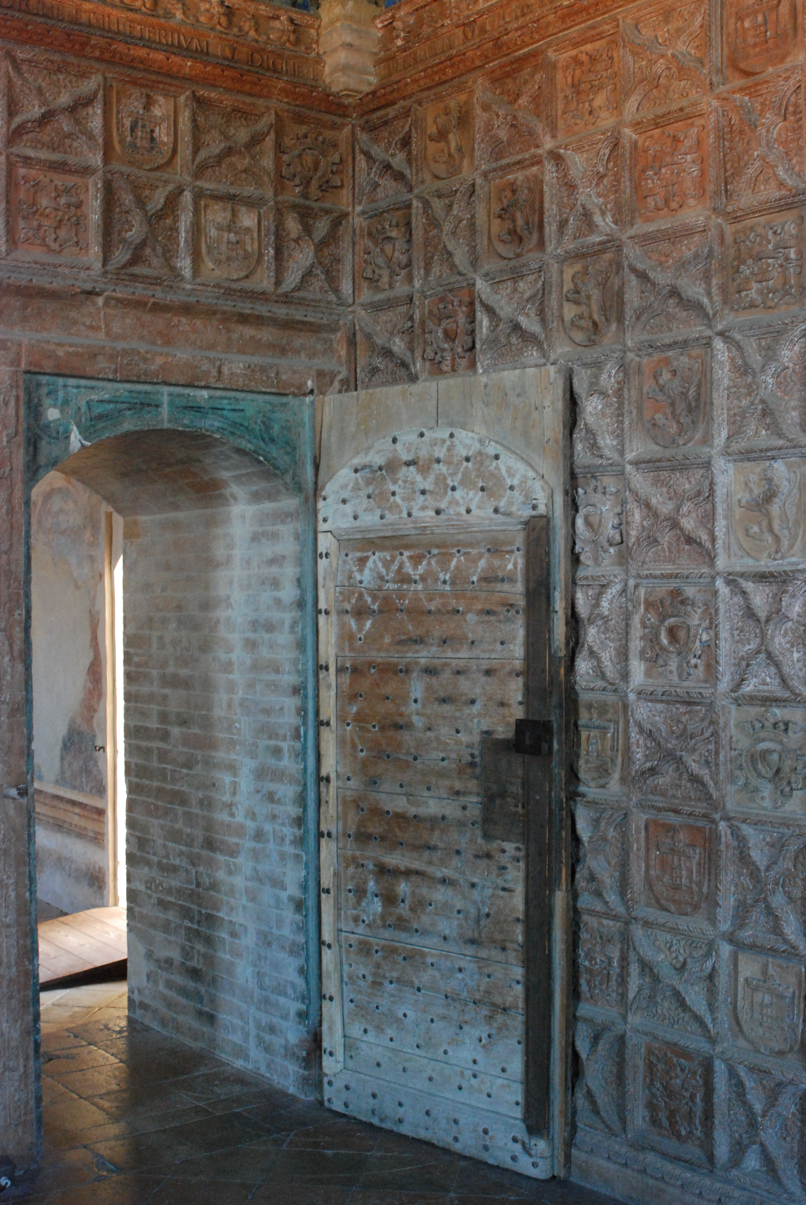 Castello di Torrechiara - MIBAC Camera degli Sposi, particolare delle pareti e la porta This is a photo of a monument which is part of cultural heritage of Italy.